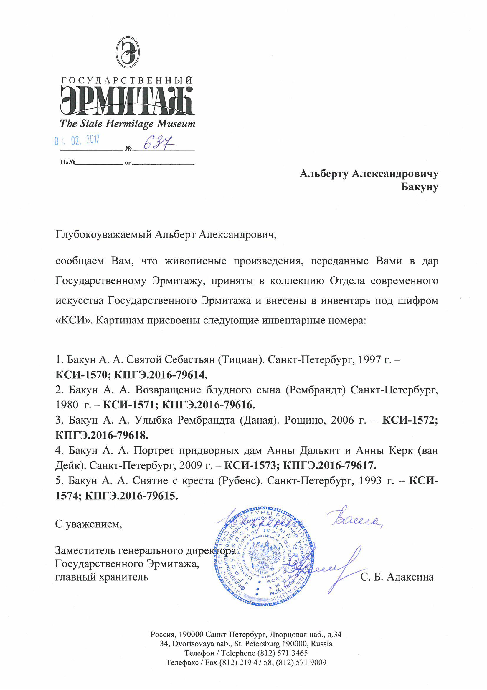 Эрмитаж Письмо